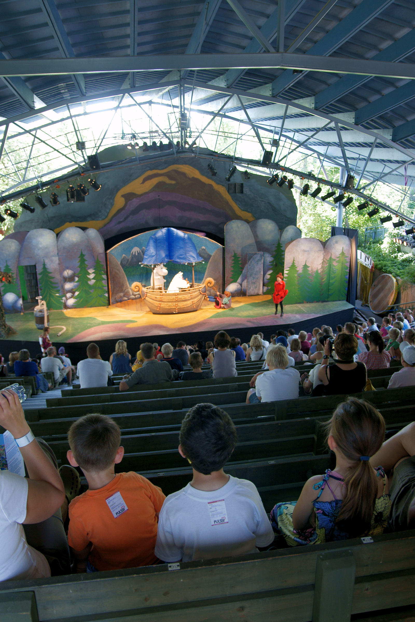 Muumiesitys menossa Teatteri Emmassa.